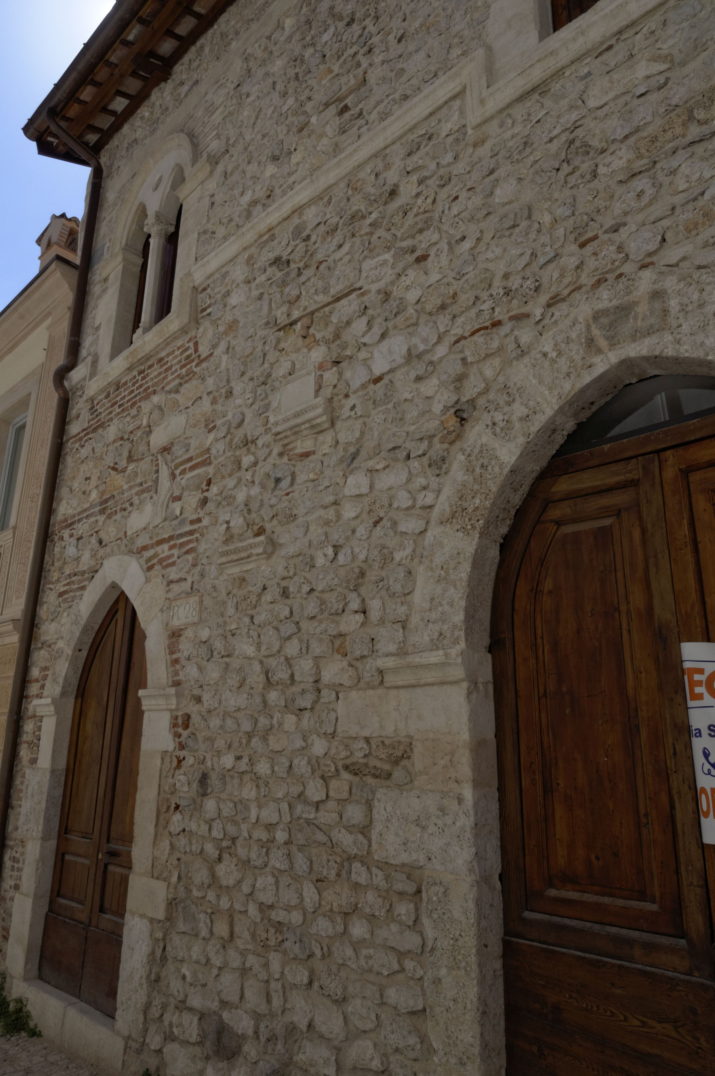 L'Aquila 2017 Dieses Foto entstand in Zusammenarbeit mit Stadtbesichtigungen.de Die Seiten Stadtbesichtigungen.de, der dazugehörige Reise Blog sowie die Facebookseite: Stadtbesichtigungen Rom dürfen dieses Bild für Ihre Veröffentlichungen ohne den Hinweis auf Wikipedia, Commons bzw der Lizenz verwenden. Die Verantwortlichen habe von mir (Ra Boe) die Originaldaten zur freien Verfügung übermittelt bekommen.